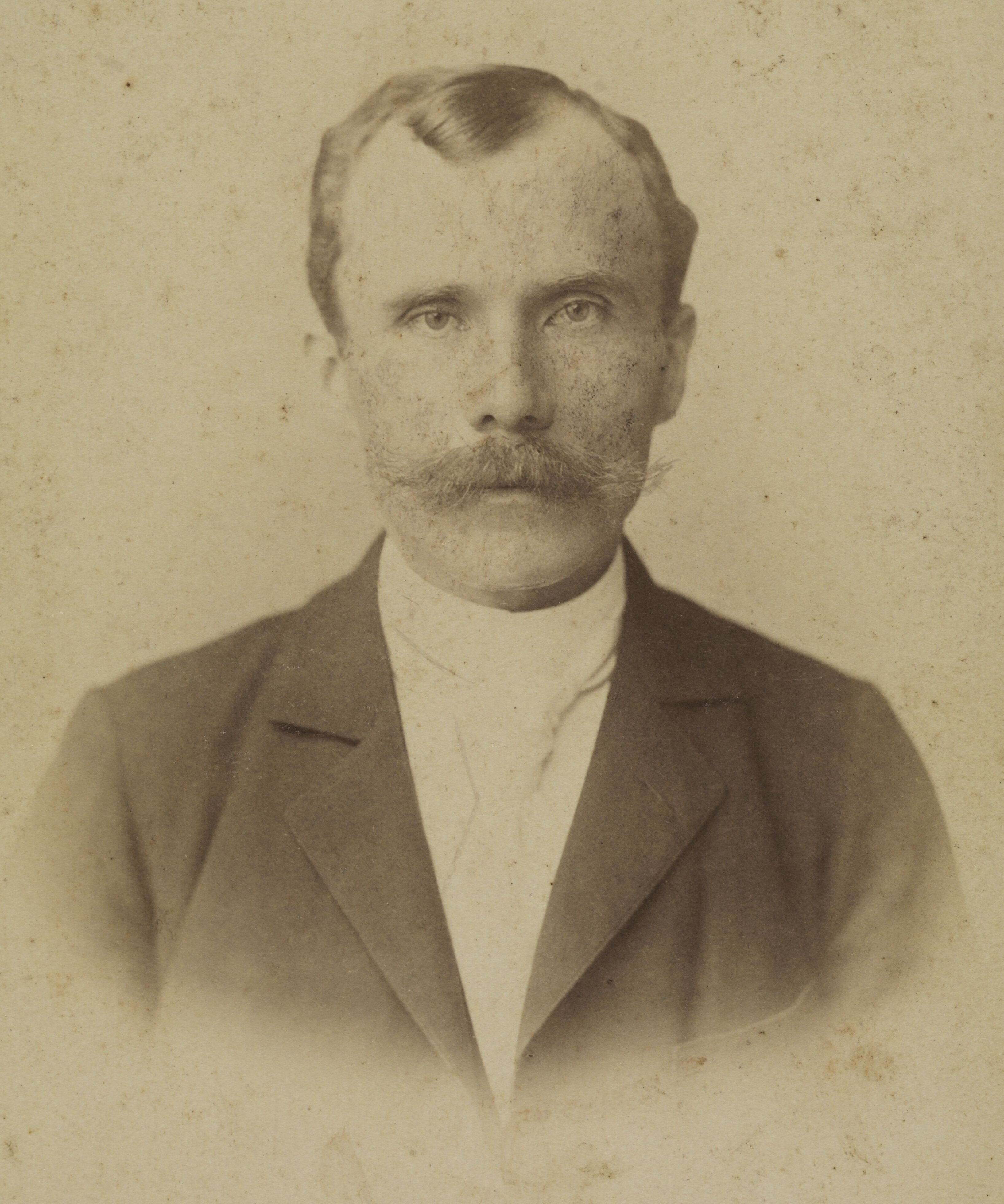 Adam Miodoński, ok. 1896 r.